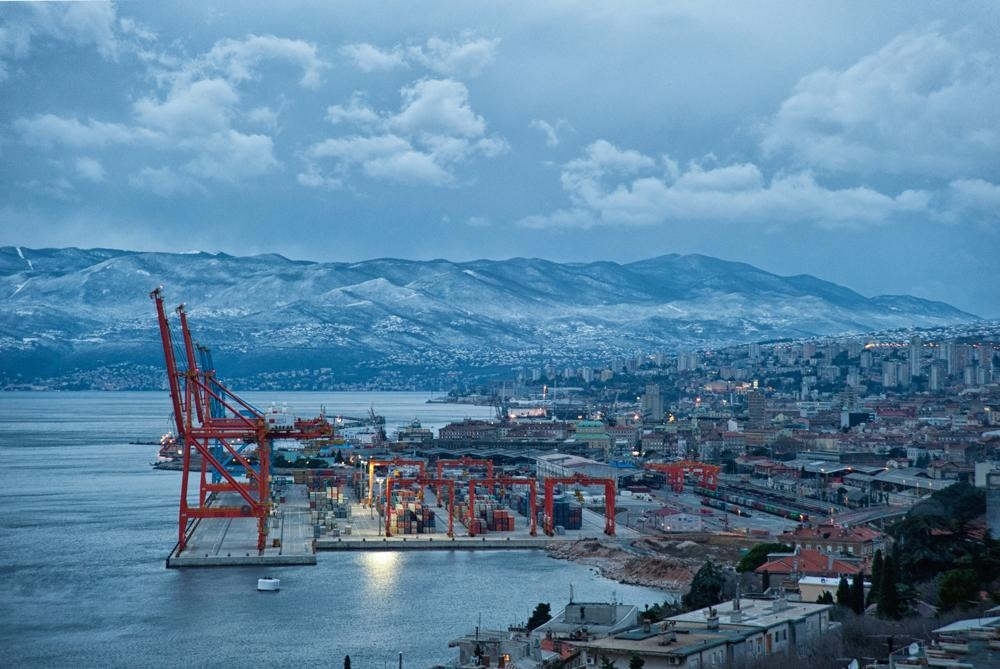 Kontejnerski terminal Brajdica, Rijeka